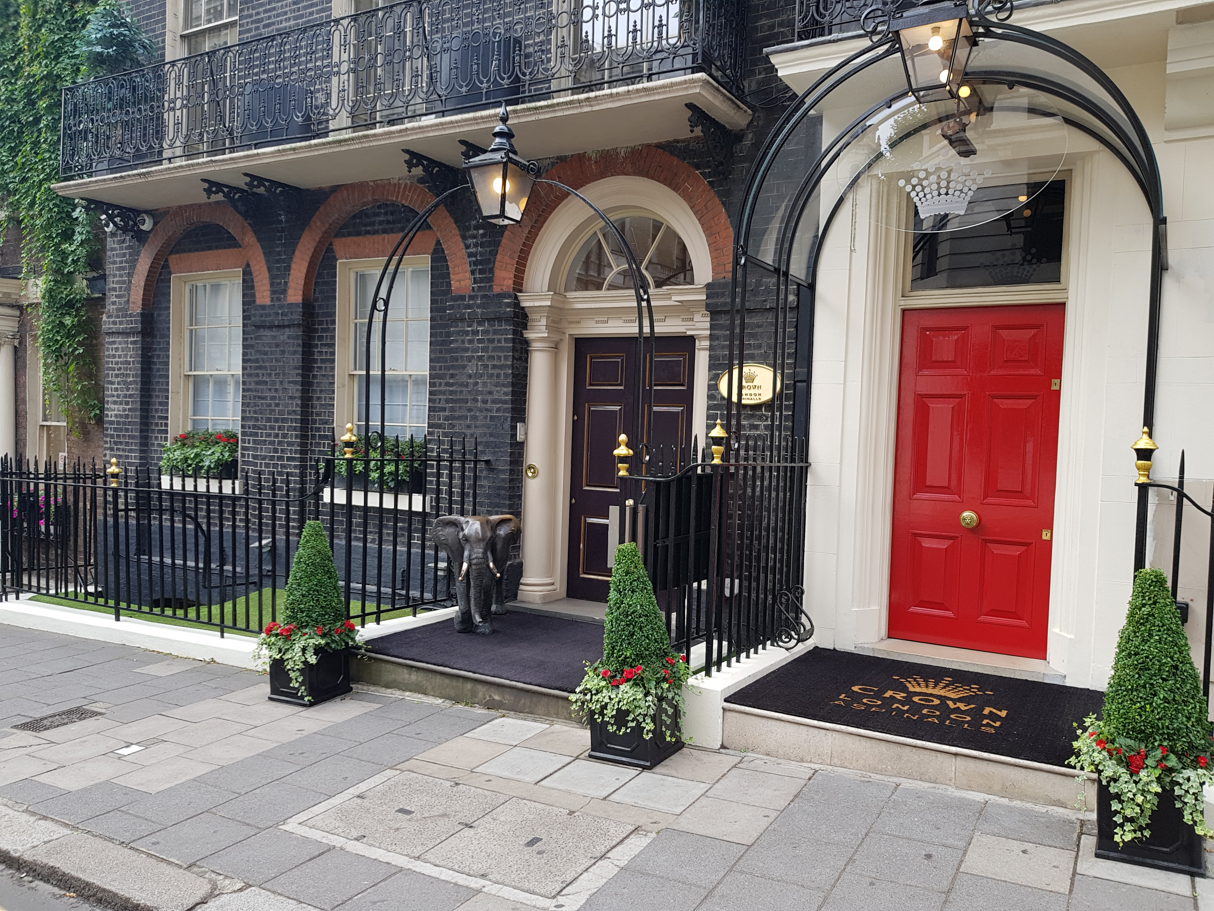 Crown London Aspinalls, cercle de jeu, 27-28, Curzon Street, Londres.